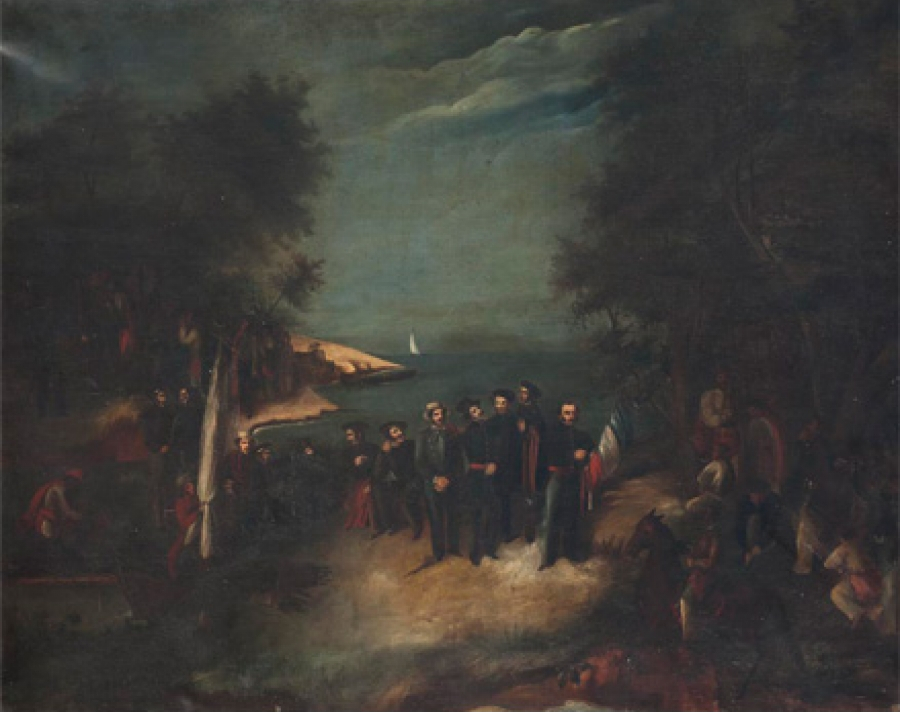 Óleo sobre tela, 97 X 122 cm. Realizado en 1854 por la pintora Josefa Palacios. Es la primera representación plástica del episodio de la independencia uruguaya conocido como el desembarco de los treinta y tres orientales. La pintura pertenece al acervo del Museo Histórico Nacional (Uruguay). Fue restaurada en 1913 por el pintor Ernesto Laroche.